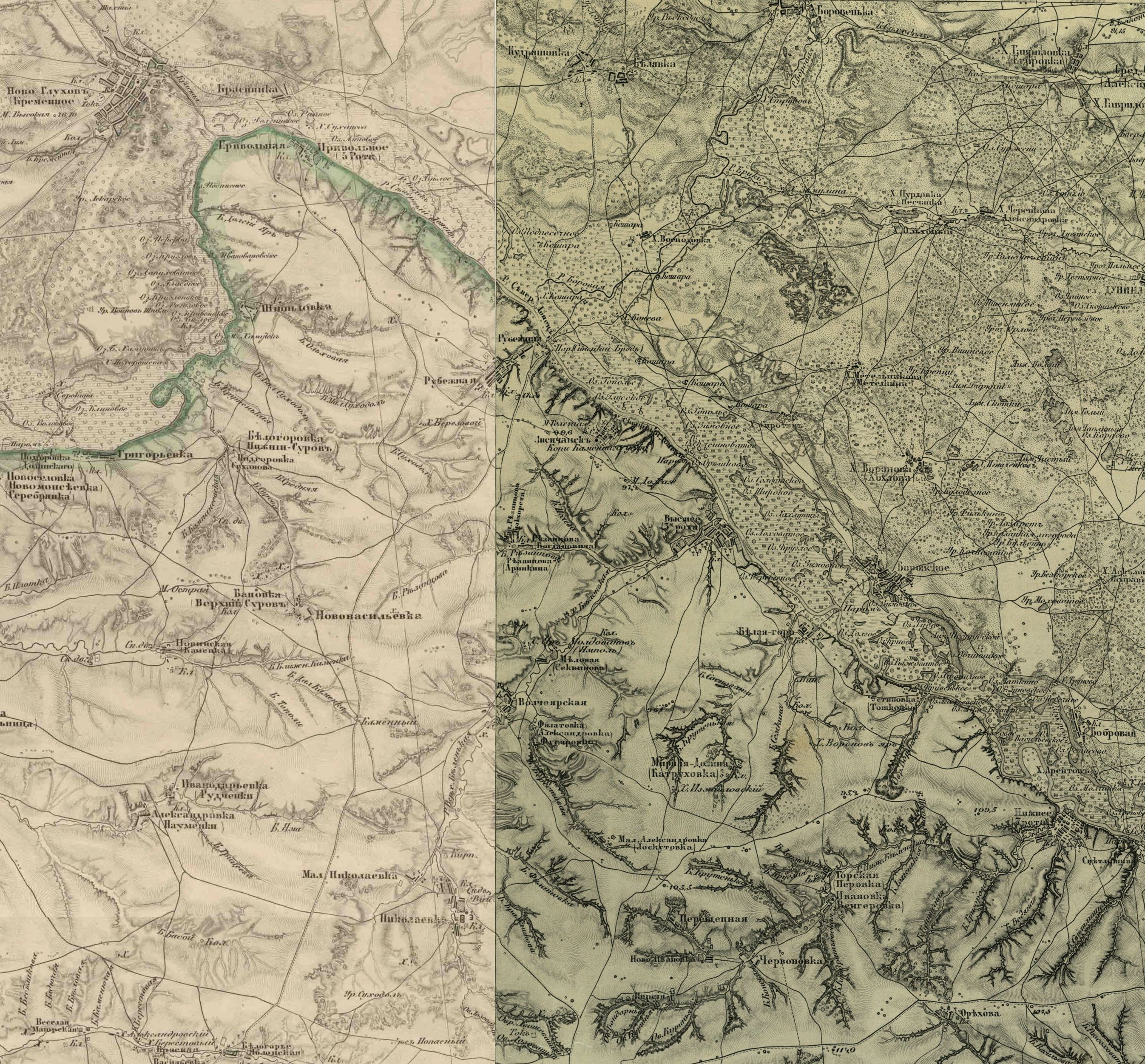 Зіставлена мапа Шуберта 1880-их років, що зображує округу Лисичанська, Сіверодонецька та Рубіжного.